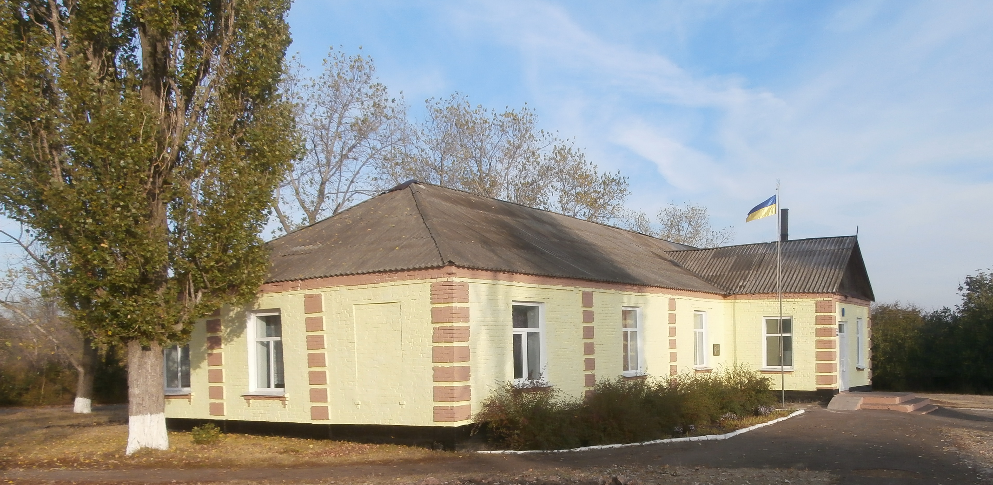 вул. Шкільна,3